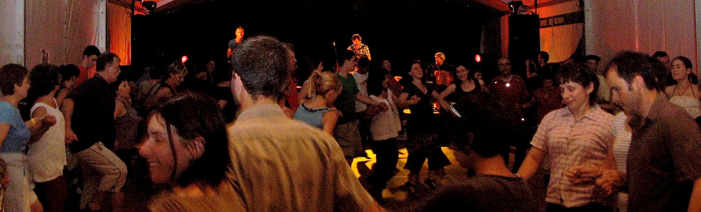 A Acós lo 26 de junh de 2010